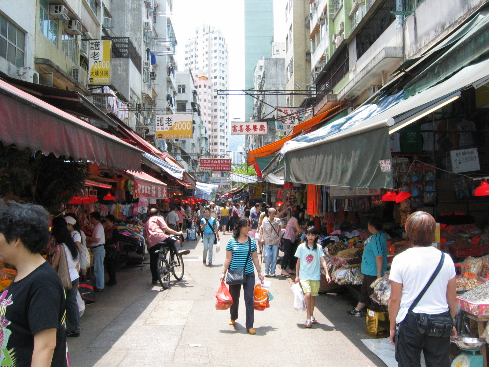 中文（香港）: 富善街的相片，由上傳者海豚愛上膠拍攝，拍攝日期：2006年4月23日